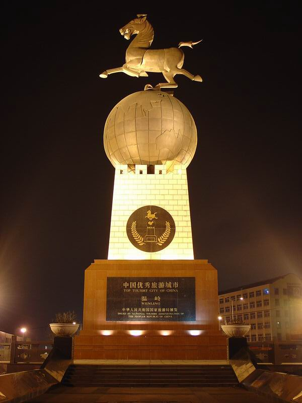 温岭